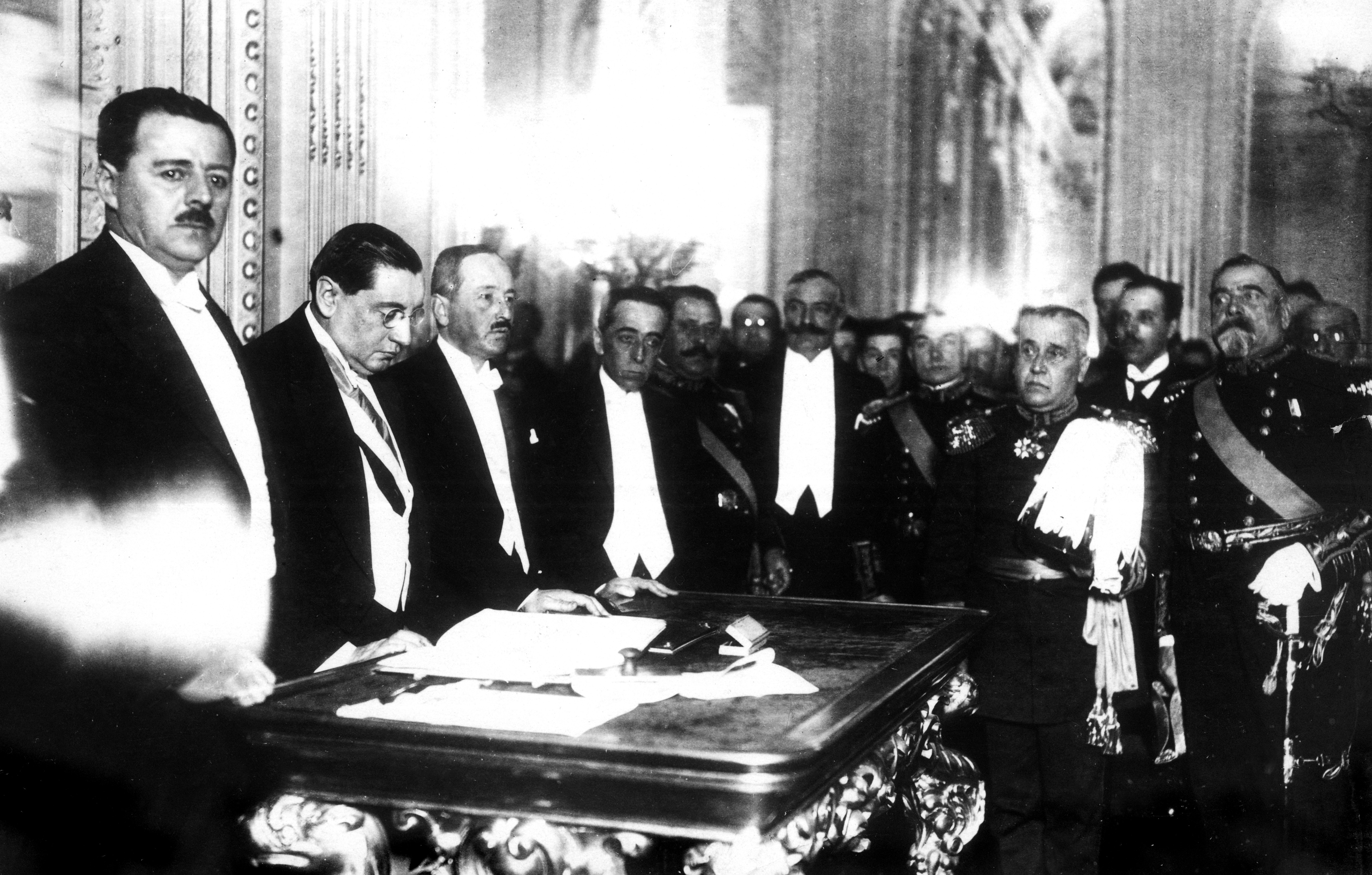 El Presidente Arturo Alessandri encabeza la firma de la Reforma de la Constitución en el Salón Rojo del Palacio de La Moneda, el 18 de septiembre de 1925, a su derecha, el Ministro del Interior Francisco Mardones Otaiza, y a su izquierda, los Ministros Jorge Matte Gormaz, Valentín Magallanes y Claudio Vicuña Subercaseaux, además de otras autoridades.